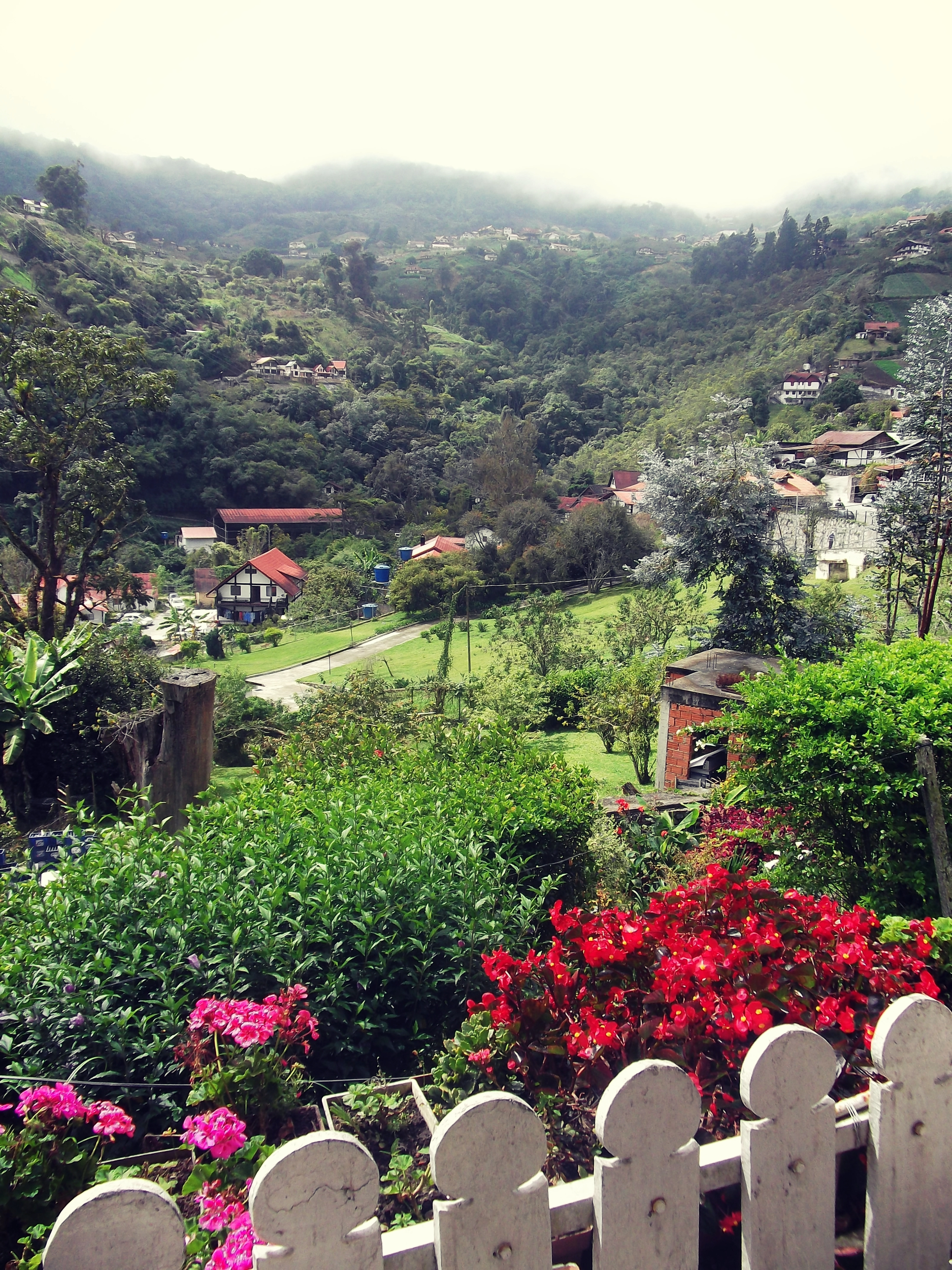 Aragua, Colonia Tovar